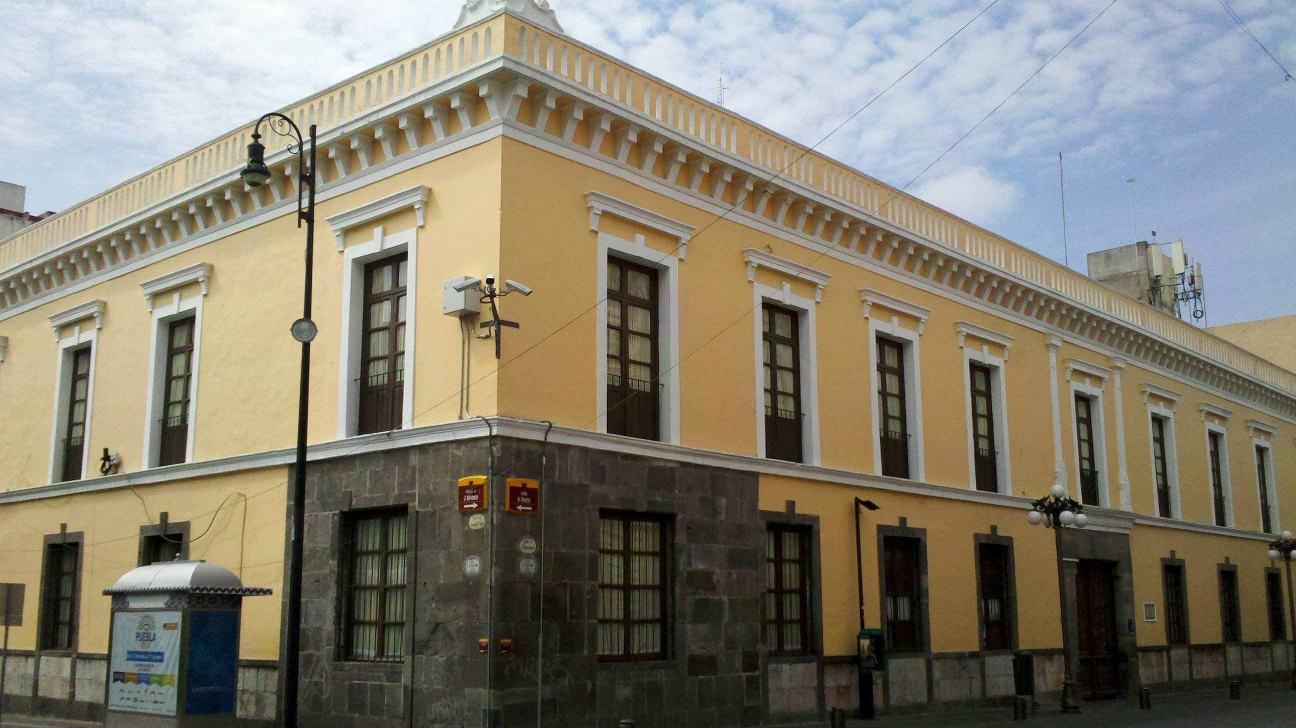 Casa de las Diligencias, Puebla, México. Siglo XVI. 4 norte 6.